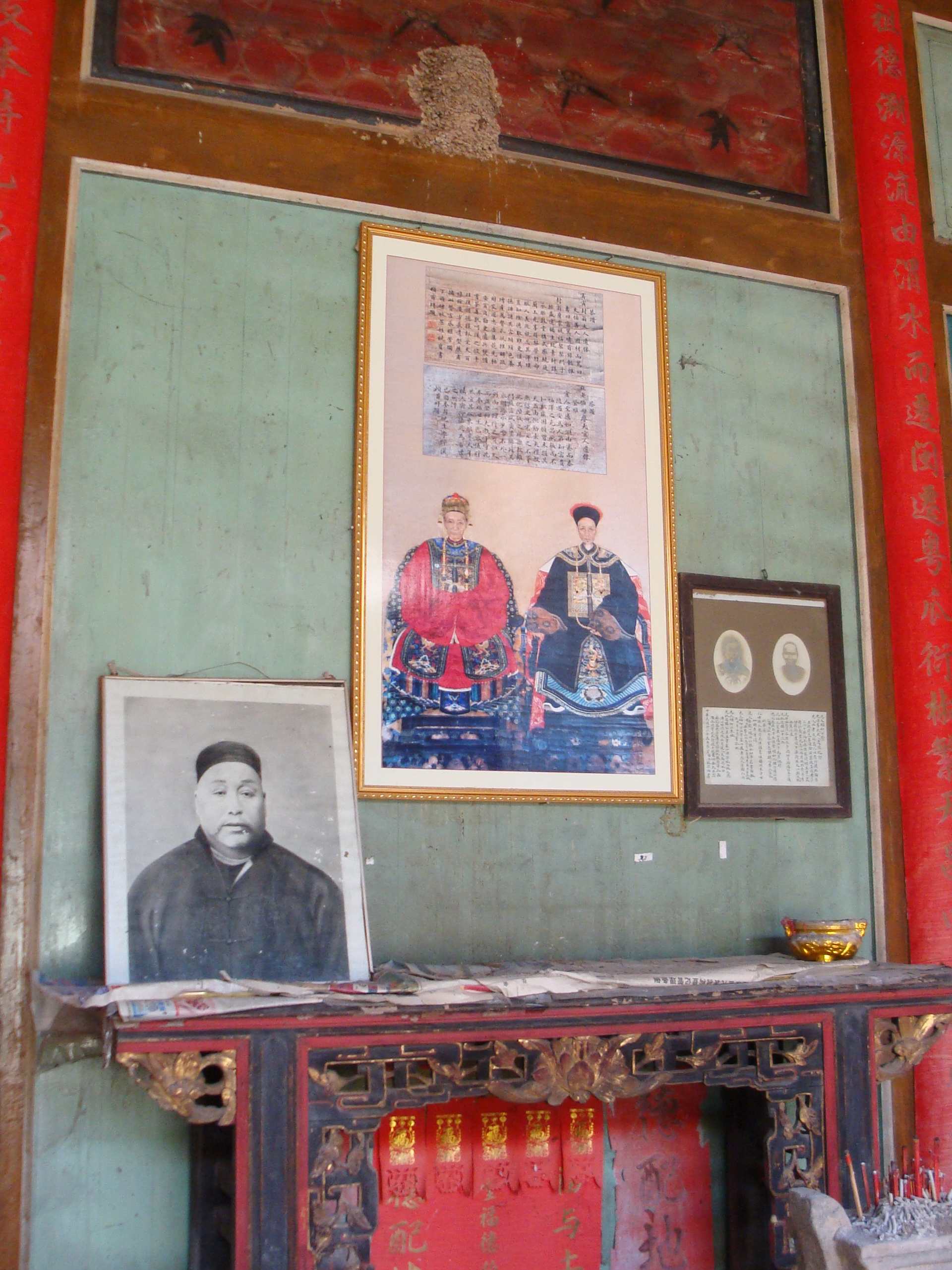 中文（中国大陆）: 牛角屋（内部）